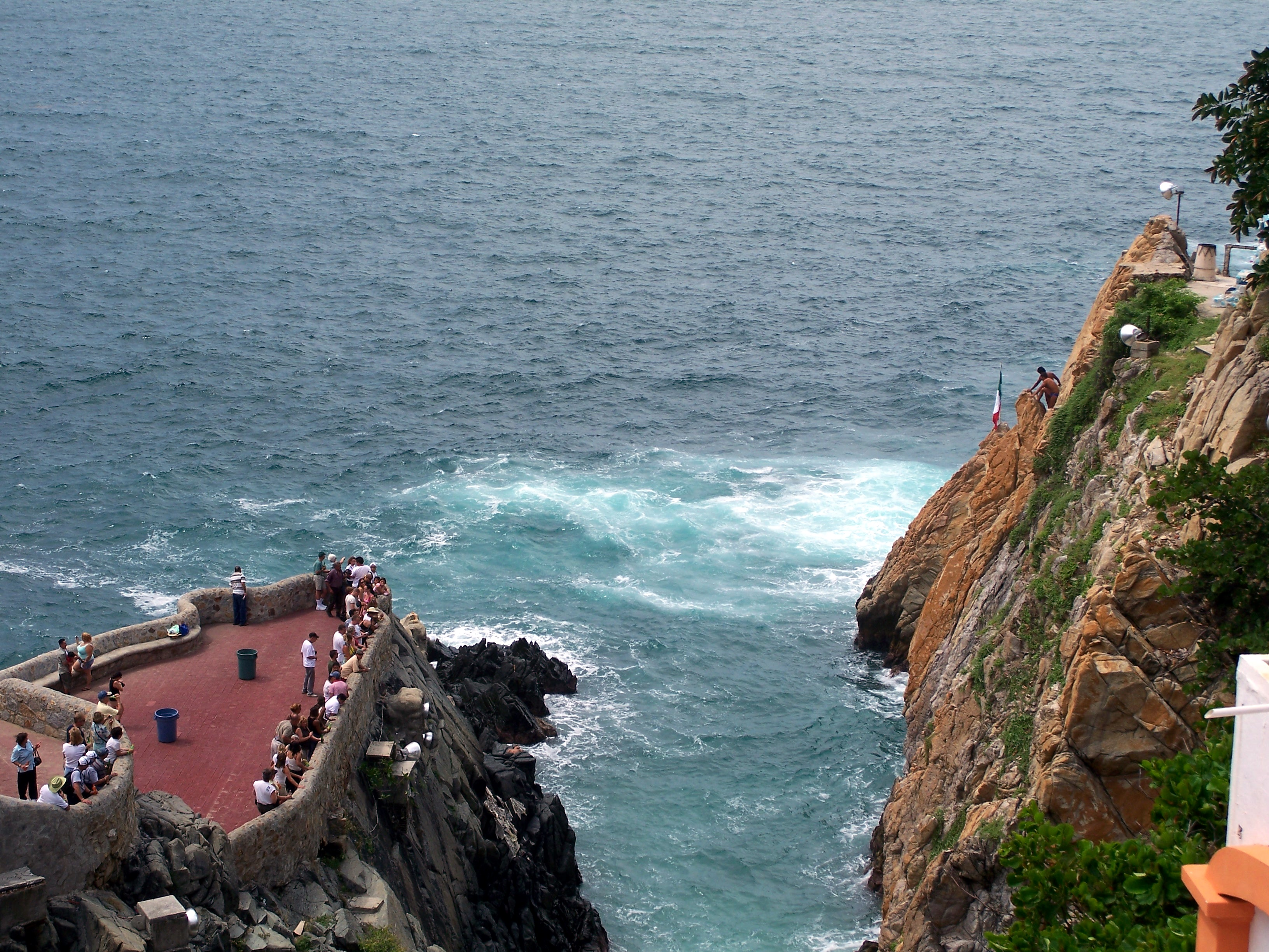 Clavadistas en La Quebrada en Acapulco, Guerrero, México